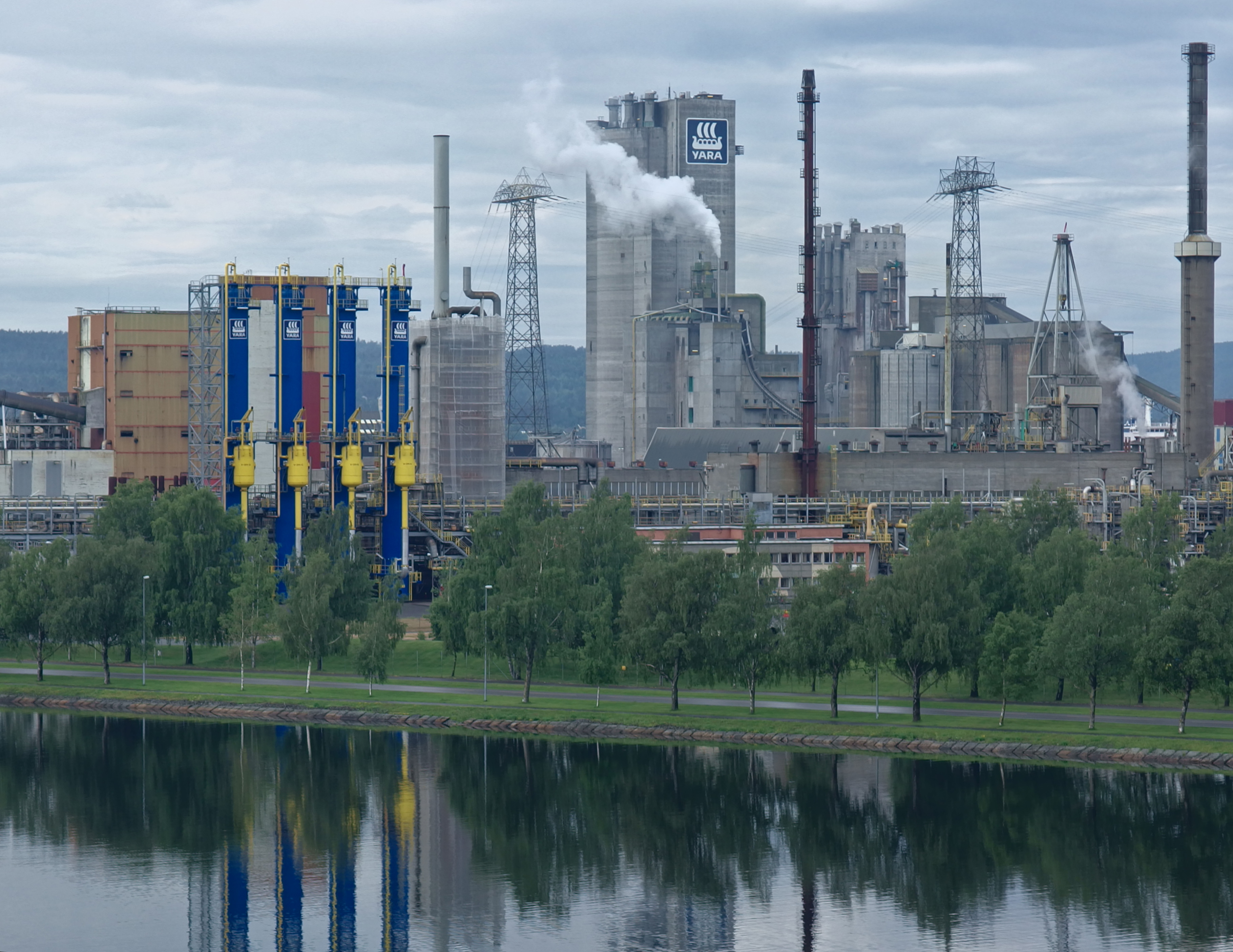 Yaras ammoniakkfarbrikk på Herøya Industripark, med fullgjødselfabrikker i bakgrunnen.